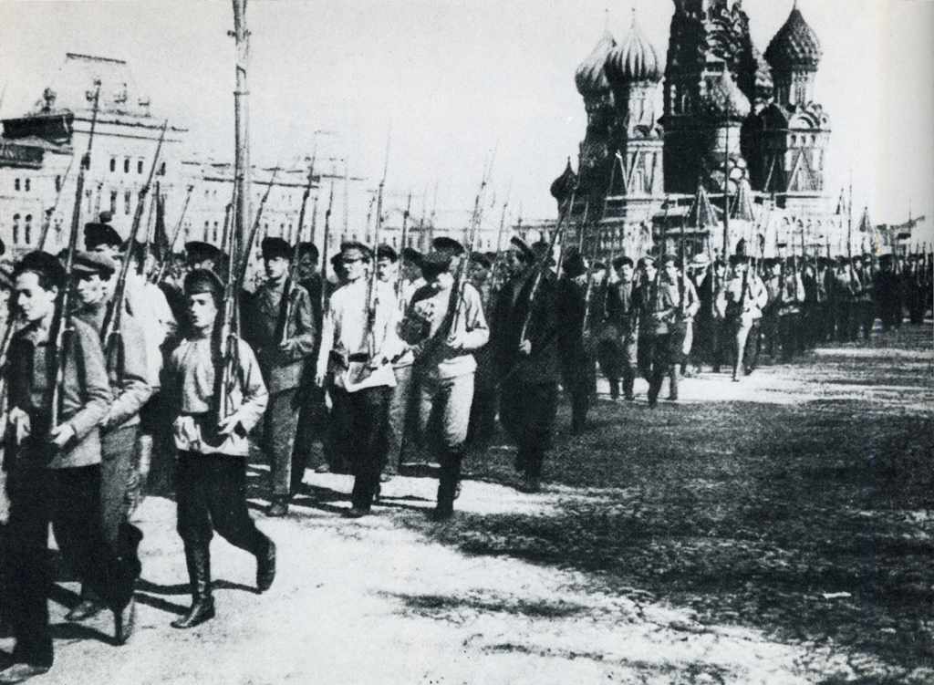 Parade der Roten Armee auf dem Roten Platz in Moskau